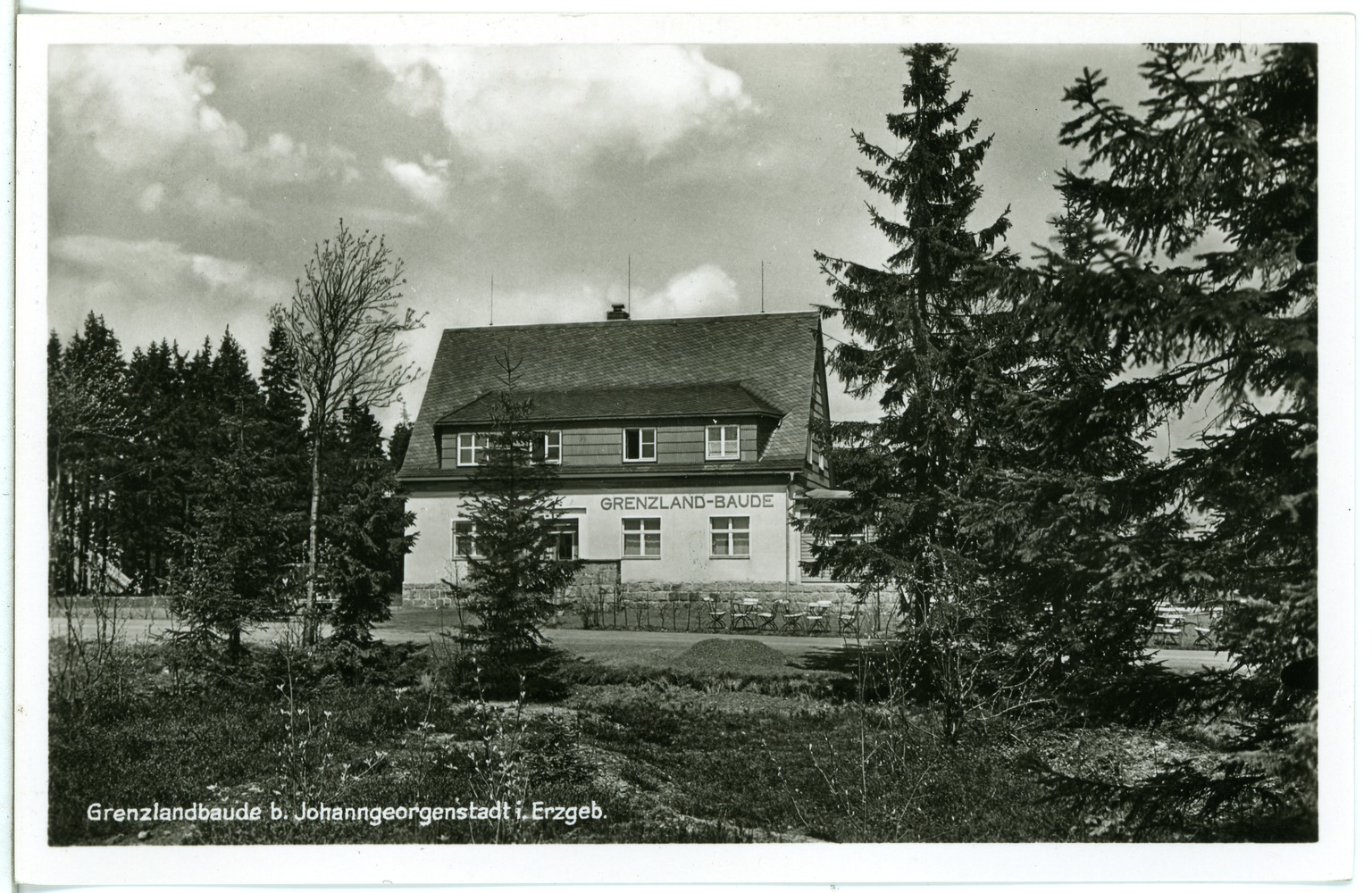 Johanngeorgenstadt; Grenzlandbaude This postcard is from publisher Brück & Sohn in Meißen ( postcard has a unique number 26837 and is available in a higher resolution at the publisher. This images was uploaded in a cooperation project between Wikipedians and the publisher.